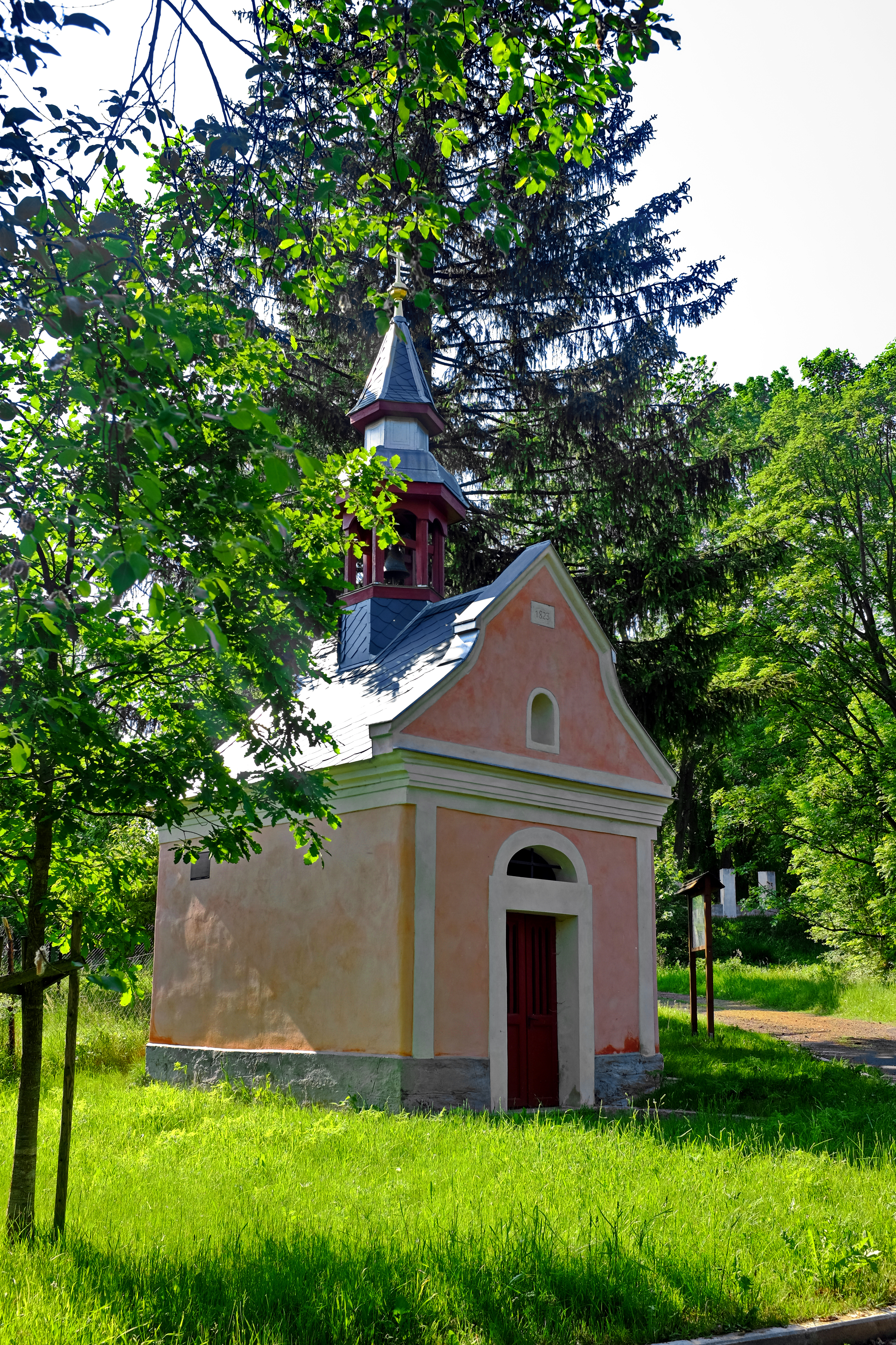 Kaplička, Maroltov.